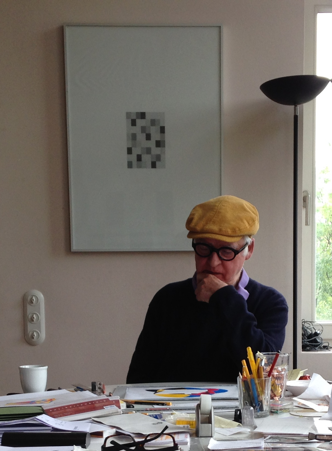 Ulrich Rückriem bei einer Bildstudie (2017)